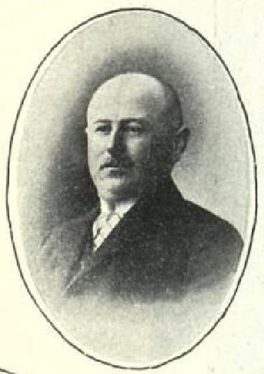 Rudolf Bergman (1876-1940), český agrárnický politik, pak československý poslanec a senátor